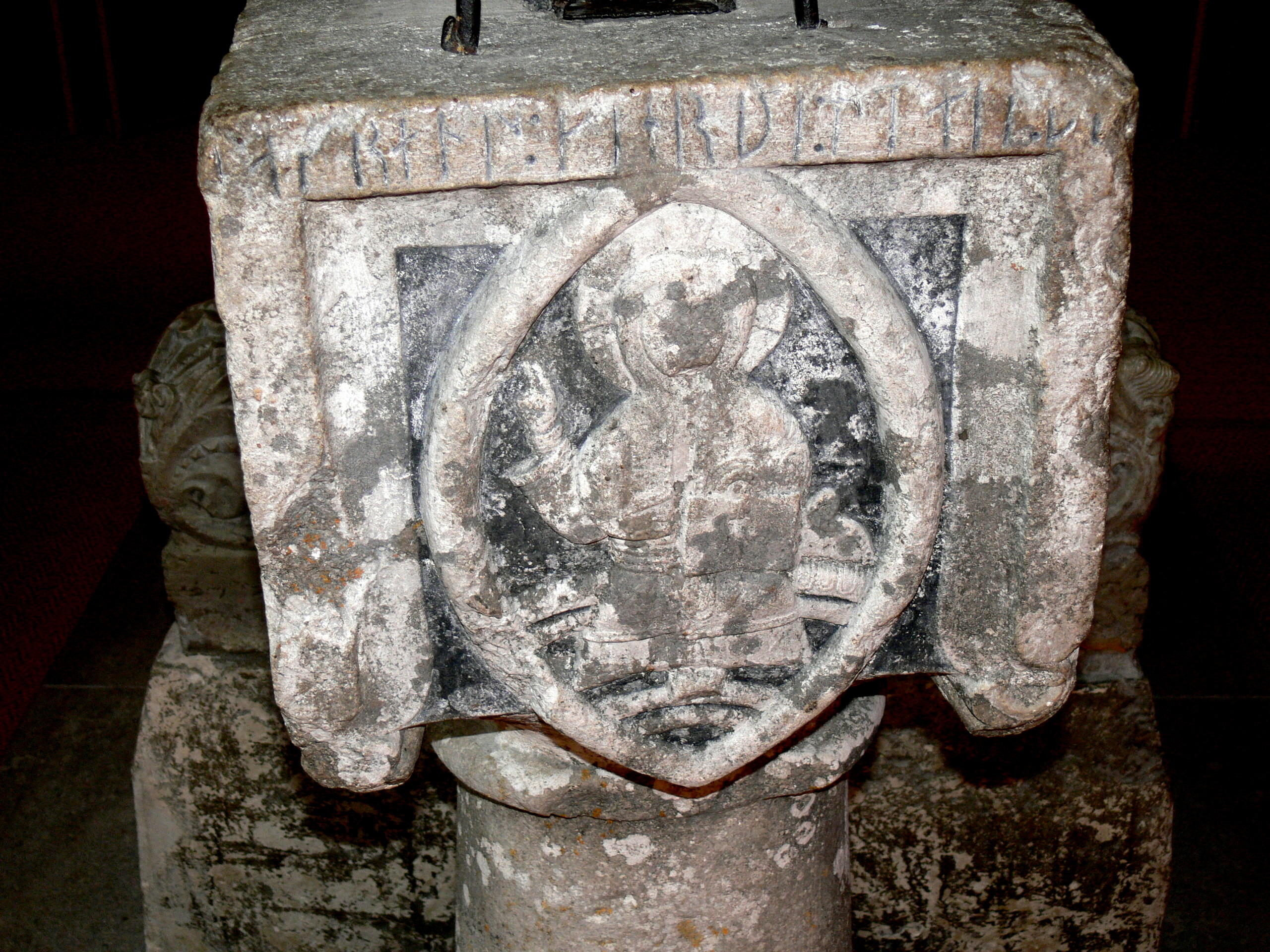 Kirche von Bunge auf Gotland aus dem 14. Jahrhundert. Almosenbüchse: Christus in der Mandorla mit Runeninschrift (G 327). Inschrift: "Lafrans machte diesen Stein."